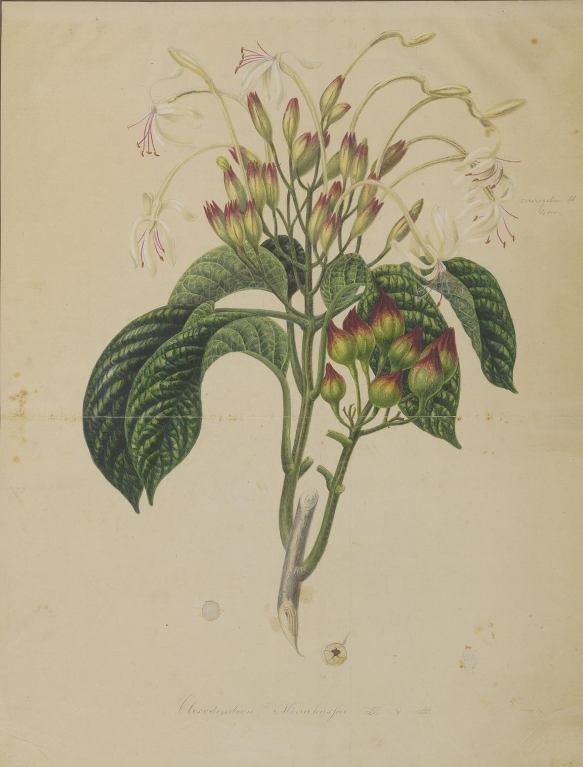 Clerodendrum minahassae Teijsmann & Binnendijk